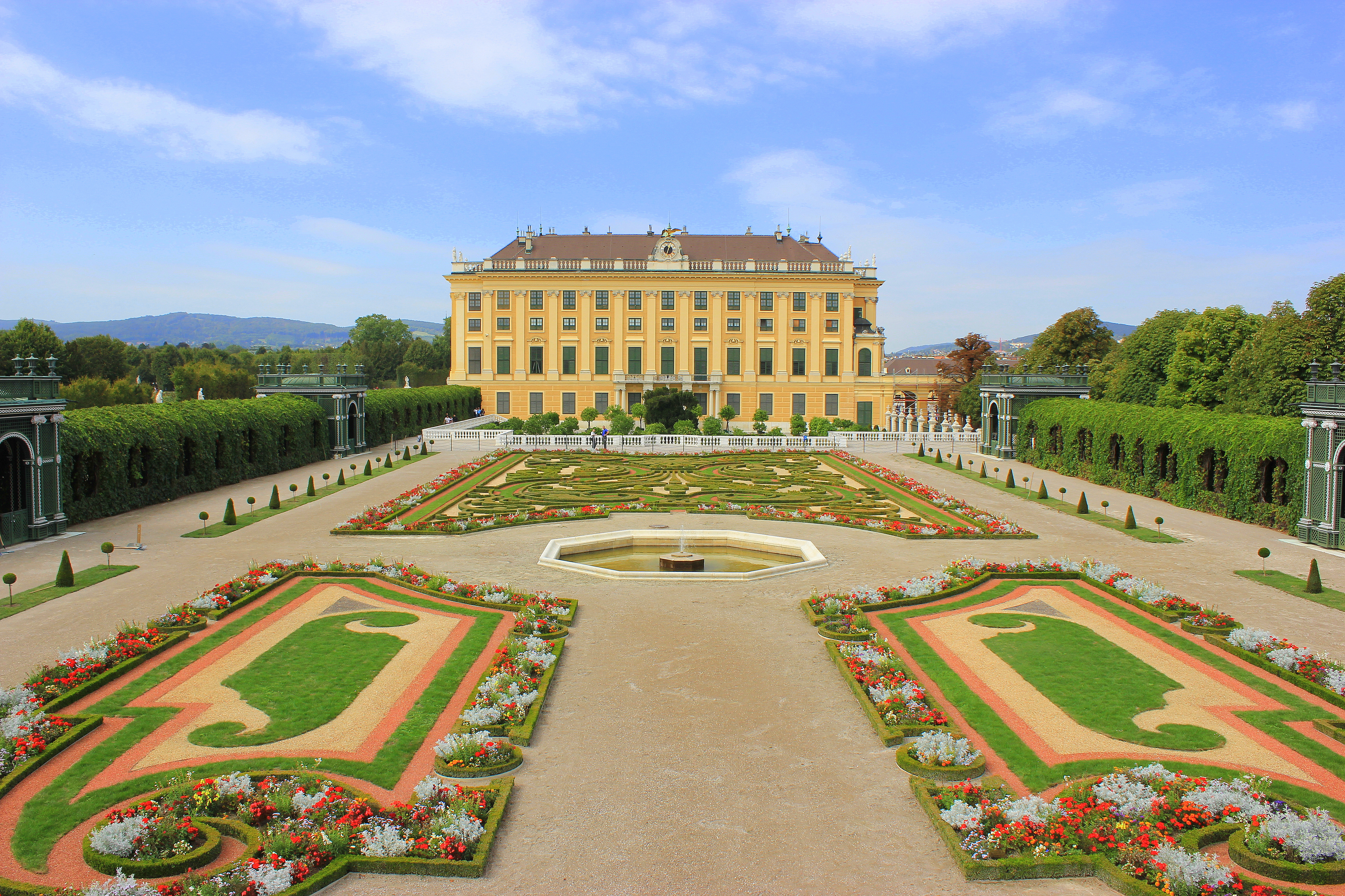 Palacio de Schönbrunn